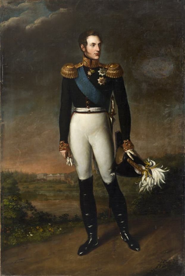 Mehe täisfiguur, poolprofiilis paremale, paremas käes valged kindad, kõrgeis säärikuis, taustaks maastik veekogu ja lossiga.